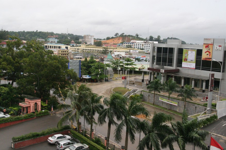 Une vue de l'île de Batam en Indonésie.